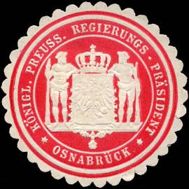 Sealing stamp Title: Königlich Preussischer Regierungs - Präsident - Osnabrück Description: rot, weiß, geprägt Place: Osnabrück size: 4 cm